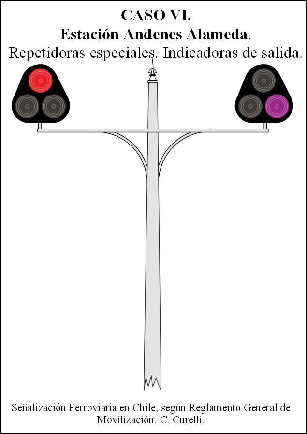 Caso especial en Andenes Alameda. Señales repetidores e indicadoras de salida. Sistema Señalizado eléctrico. Anexo A RGM. FFCC del E. (Chile)